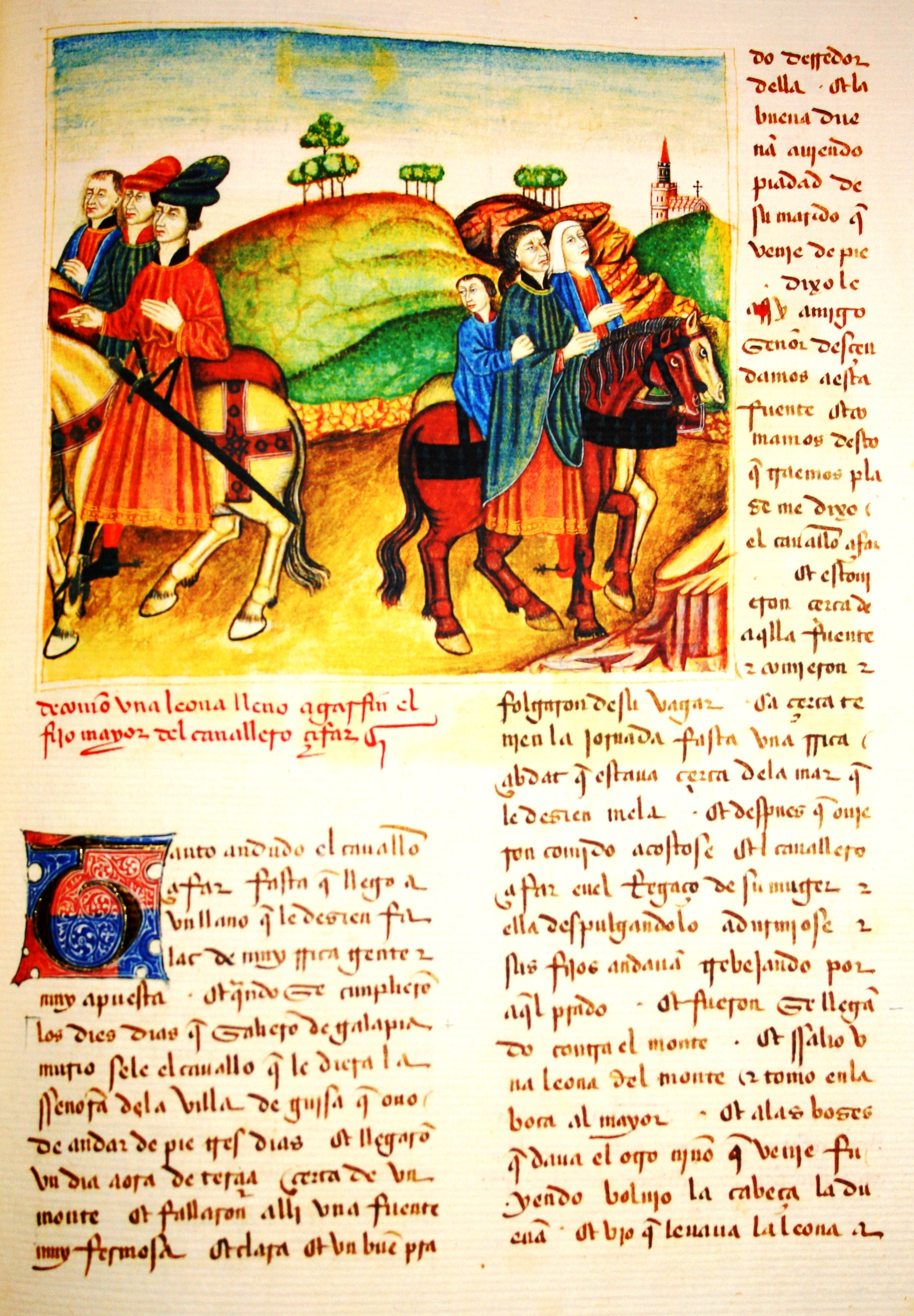 Libro del caballero Zifar, f32r.º del Manuscrito de París (ms. espagnol 36 (Bibliothèque Nationale de France)